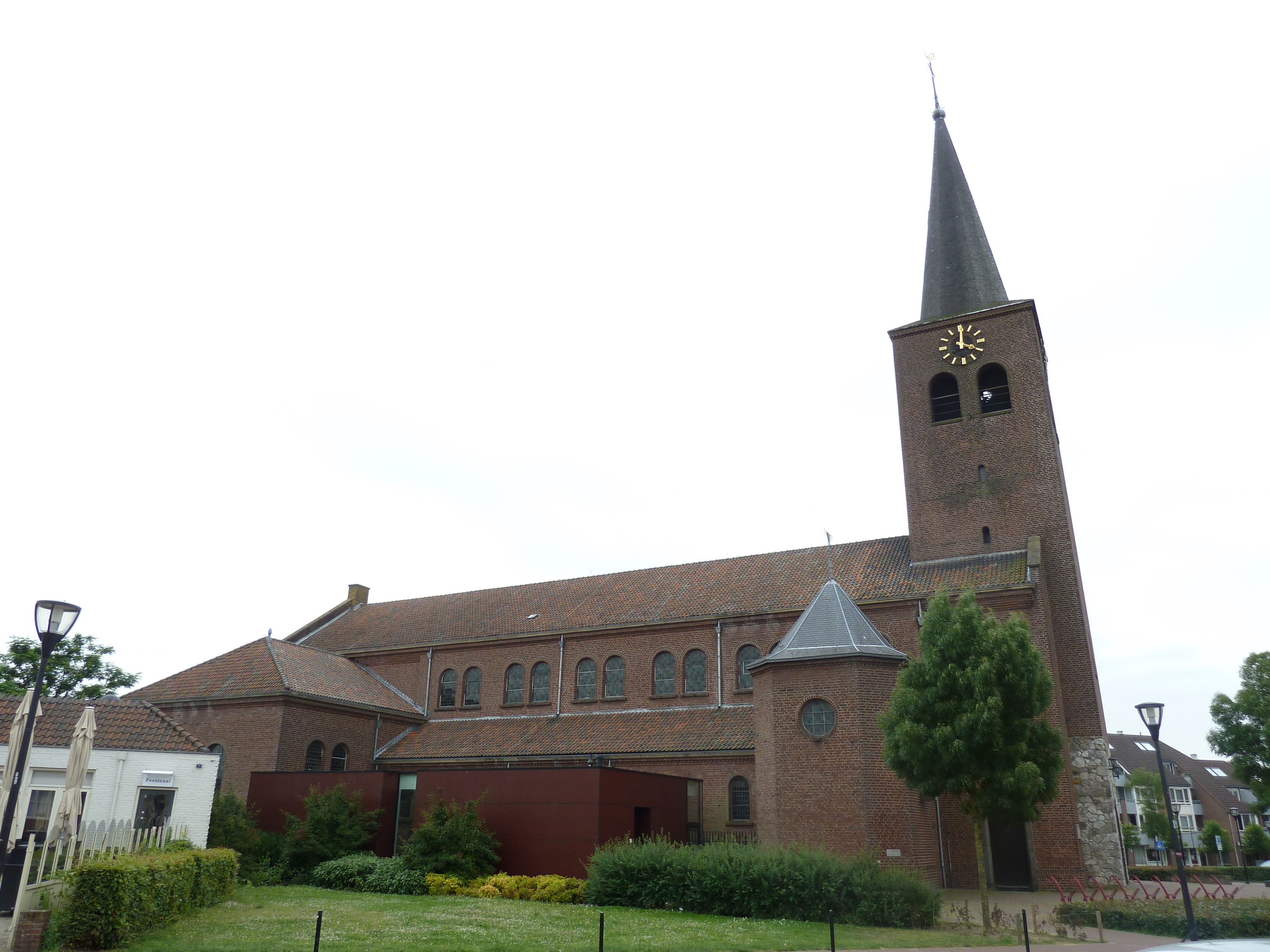 Sint-Lambertuskerk, Haelen, Nederland